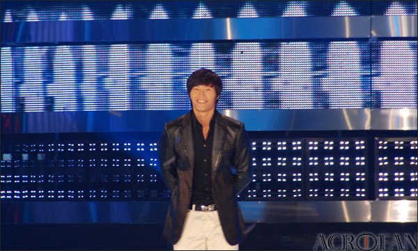 농심 협찬 제9회 2008 사랑나눔콘서트